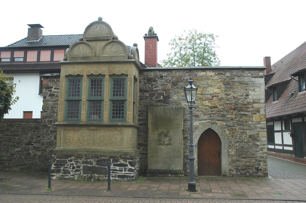 Archivhäuschen, ehemaliges Gartenhaus, erbaut 1565 vom Obristen Hilmar von Münchhausen in Rinteln, diente später der Aufbewahrung von Urkunden und Akten, aus Obernkirchener Sandstein errichtet